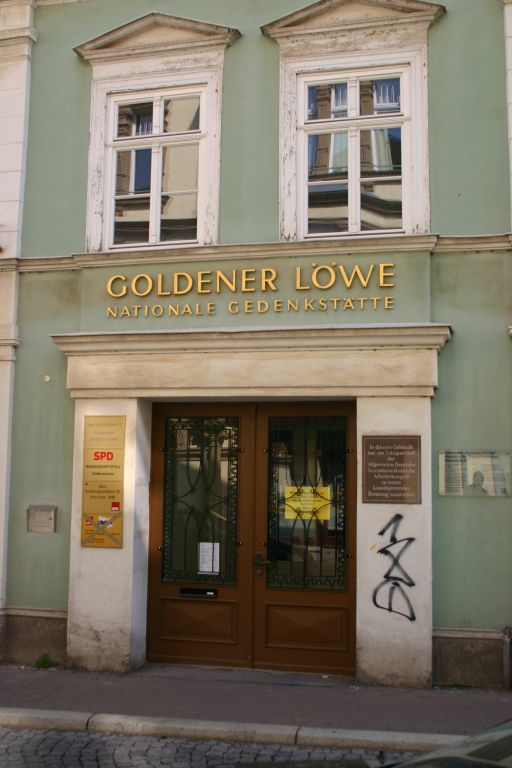 Nationale Gedenkstätte Goldener Löwe in Eisenach